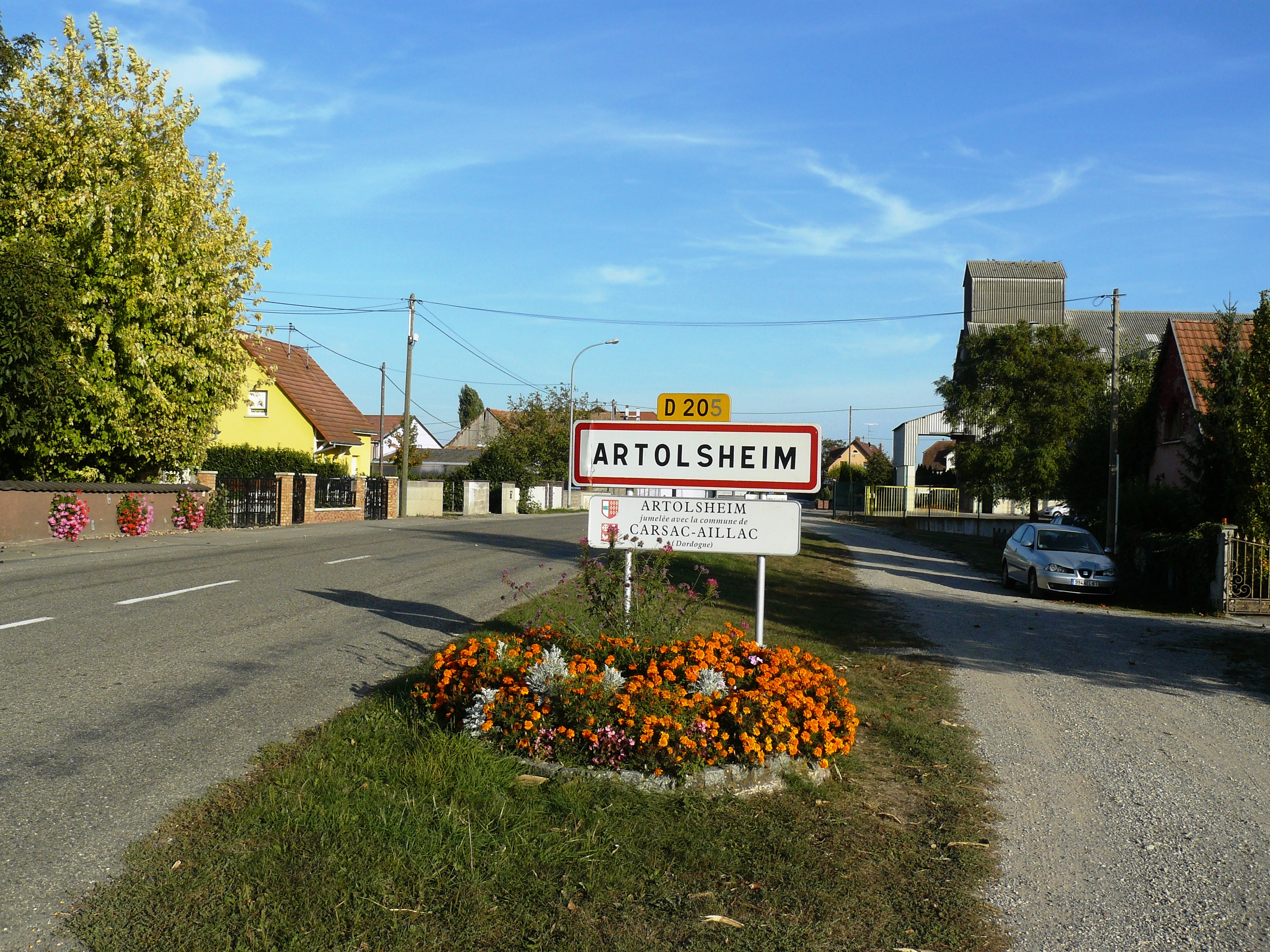 Entrée du village d'Artolsheim